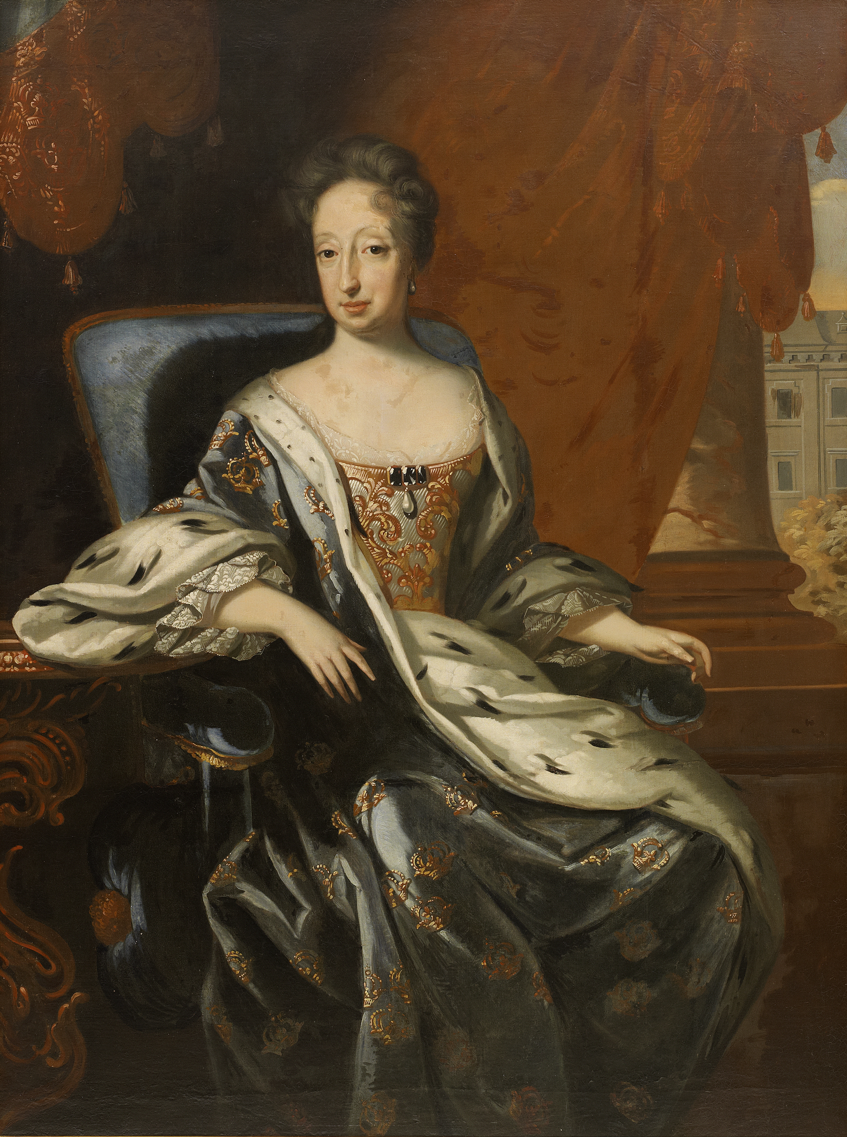 Portrait der Hedvig Eleonora, Königin von Schweden in ihrem 70. Lebensjahr.